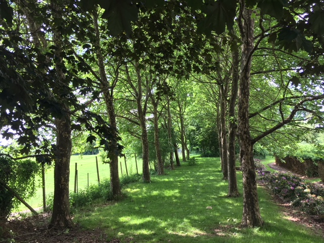 Kleine Allee im Schlossgarten